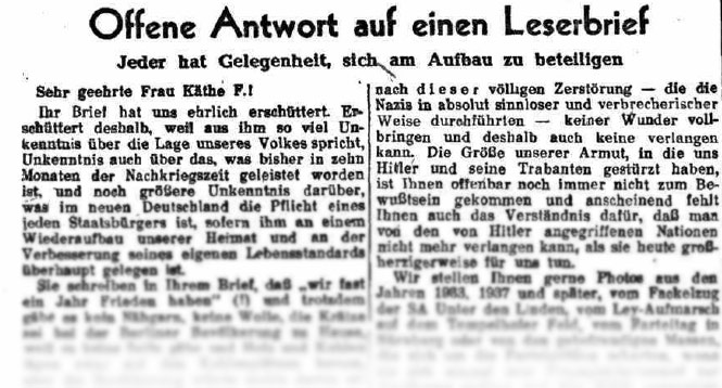 Redaktion der Berliner Zeitung reagiert auf einen Leserbrief. Volle Version